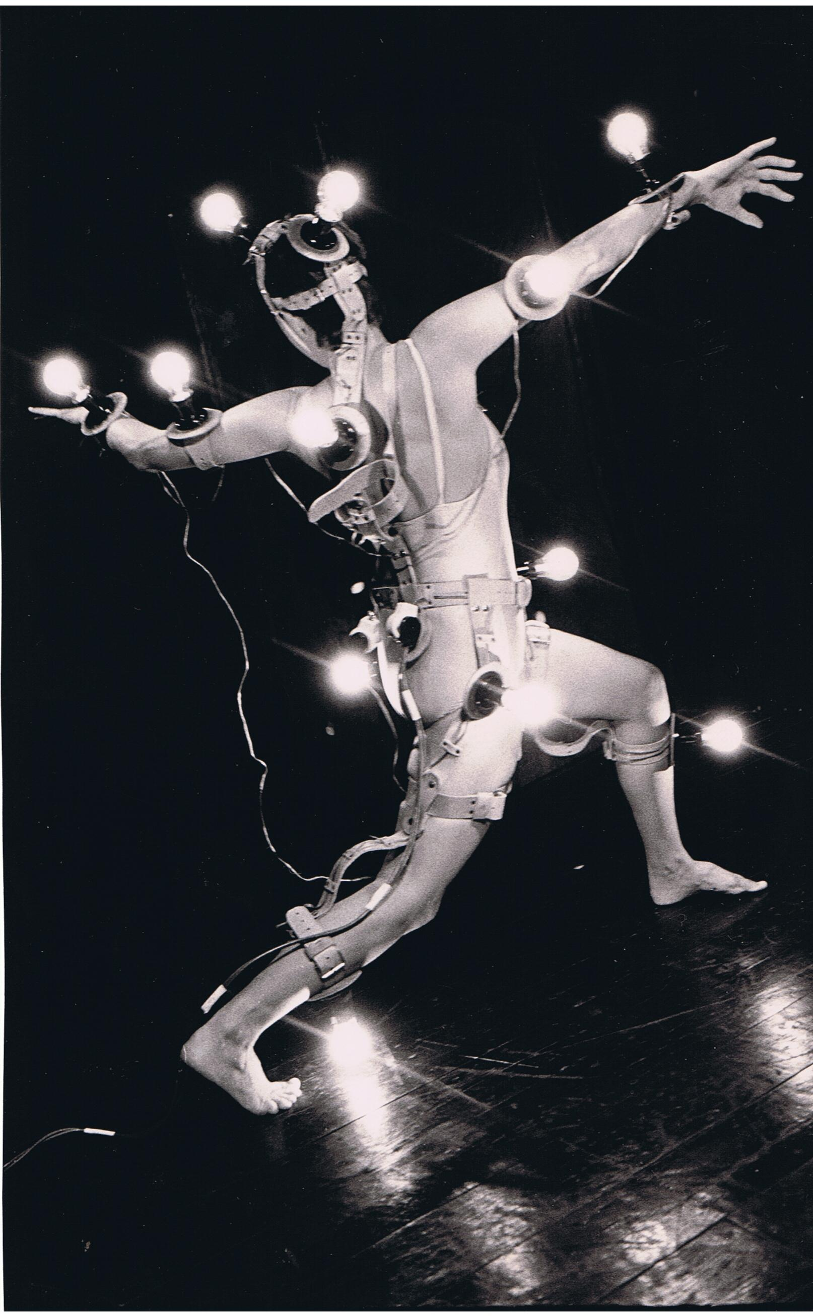 רות אשל היא רקדנית, חוקרת מחול, כוריאוגרפית ומבקרת מחול . רות אשל באמזונה קומפקטית (1986) - בימוי ורתמה - אלי דור כהן, צילום - מורל דרפלר